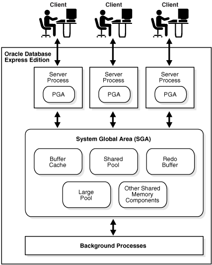 Imagen de procesos de usuarios